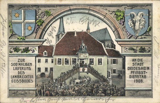 Ansichtskarte Rathaus Deidesheim 1906